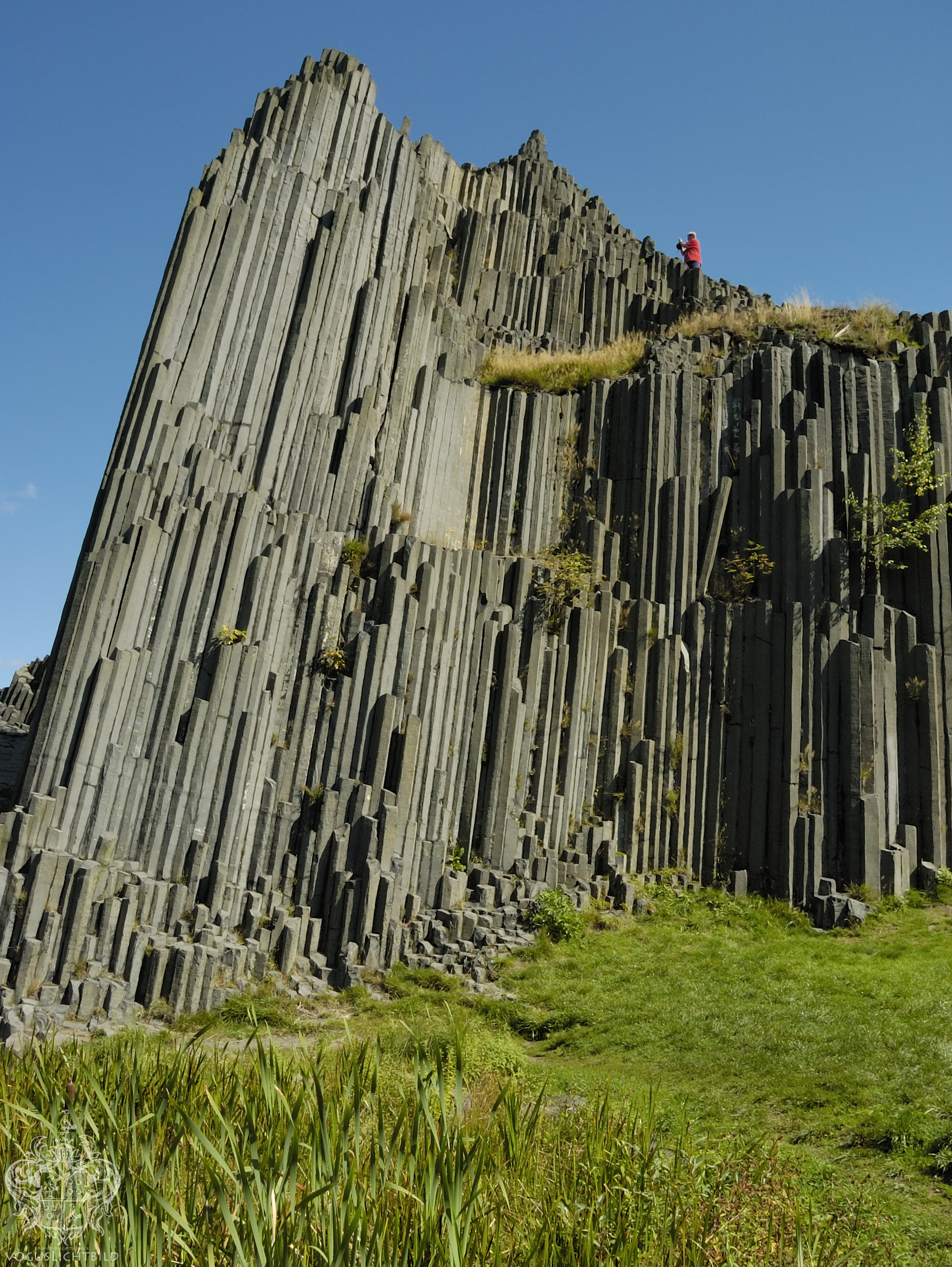 Der urzeitliche Herrenhausfelsen im böhmischen Parchen